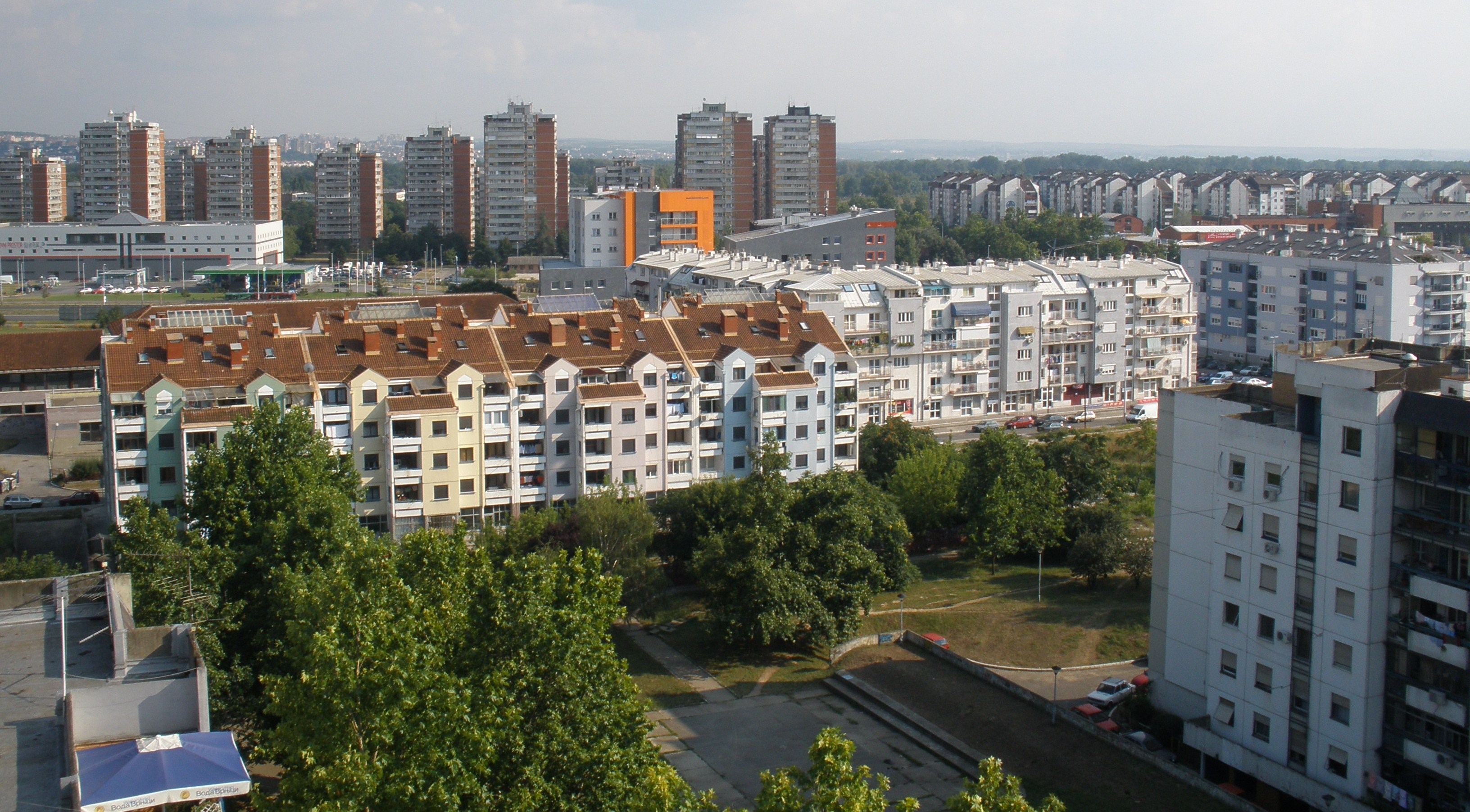 Južni deo Beloka 64 i Blokovi 70 i 44 u pozadini